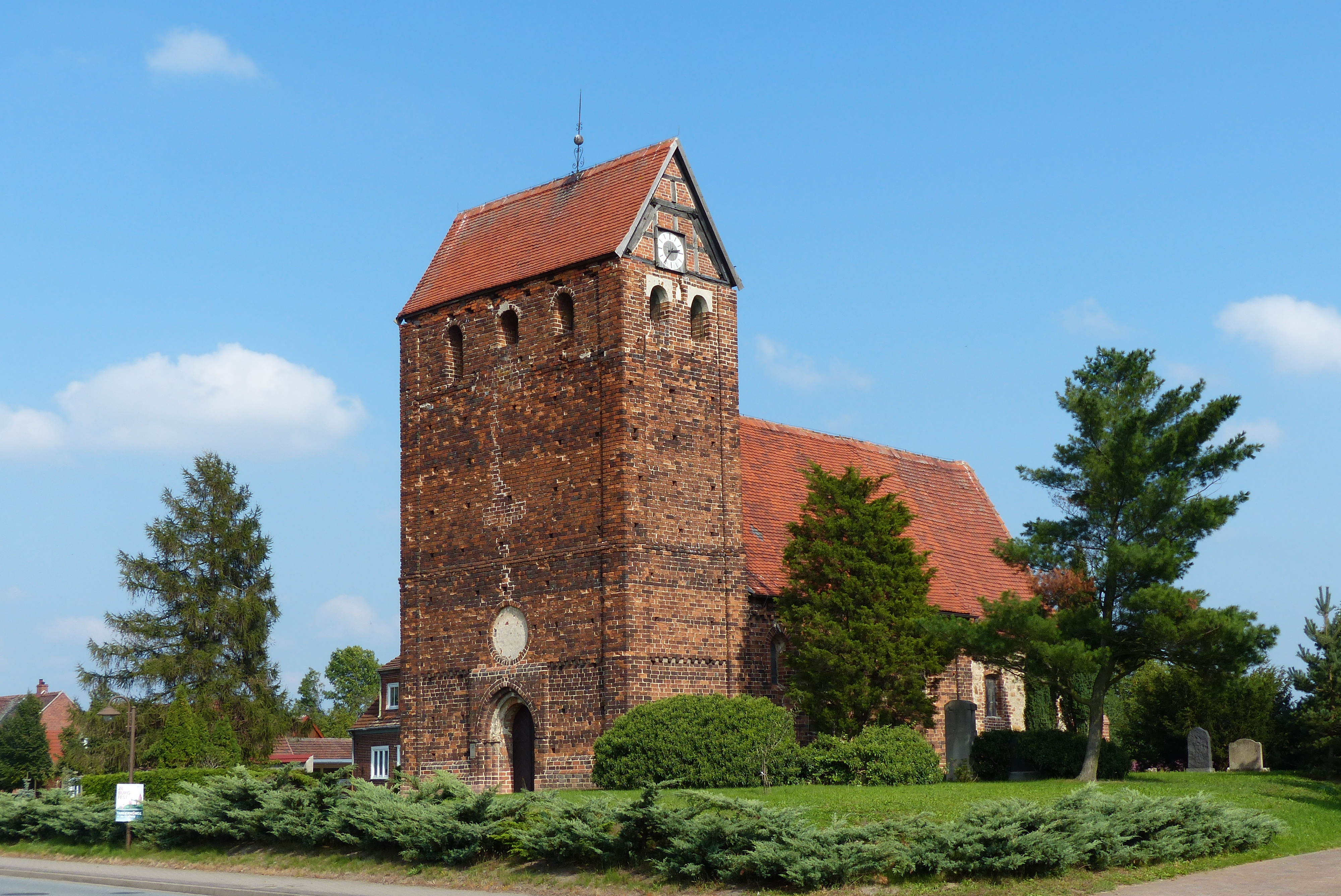 Der Wehrturm der spätromanischen Kirche (um 1220 - 1250 errichtet) nimmt die ganze Breite des Kirchenschiffes ein. Aus gutem Grund waren die Kirchen so beschaffen, denn Rückeroberung durch die Slawen drohte den östlich der Elbe gelegenen Landstrichen mit ihren noch jungen Christengemeinden. Die Lage der Kirche auf einem flachen Hügel - immerhin der höchsten Stelle des Dorfes - bewahrte sie 2013 vor dem gewaltigen Hochwasser der Elbe, das Fischbeck infolge eines Deichbruchs zu großen Teilen flutete.